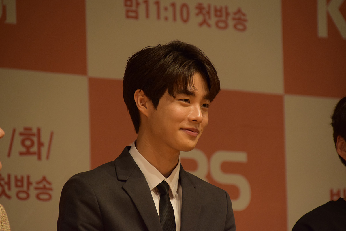 김관수 KBS 2TV 오피스드라마 '회사가기싫어' 제작발표회 (2019.4.8)